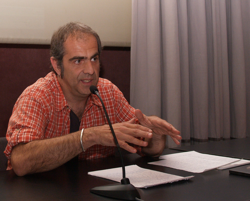 El fotógrafo vasco Txelu Angoitia durante una conferencia en la Sala Luis de Ajuría de Vitoria (Álava)